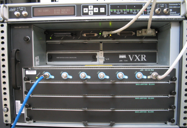 CMTS - kontroler modemów kablowych dla usługi transmisji danych - Internetu w sieci kablowej. Najpopularniejszy model w Polsce.